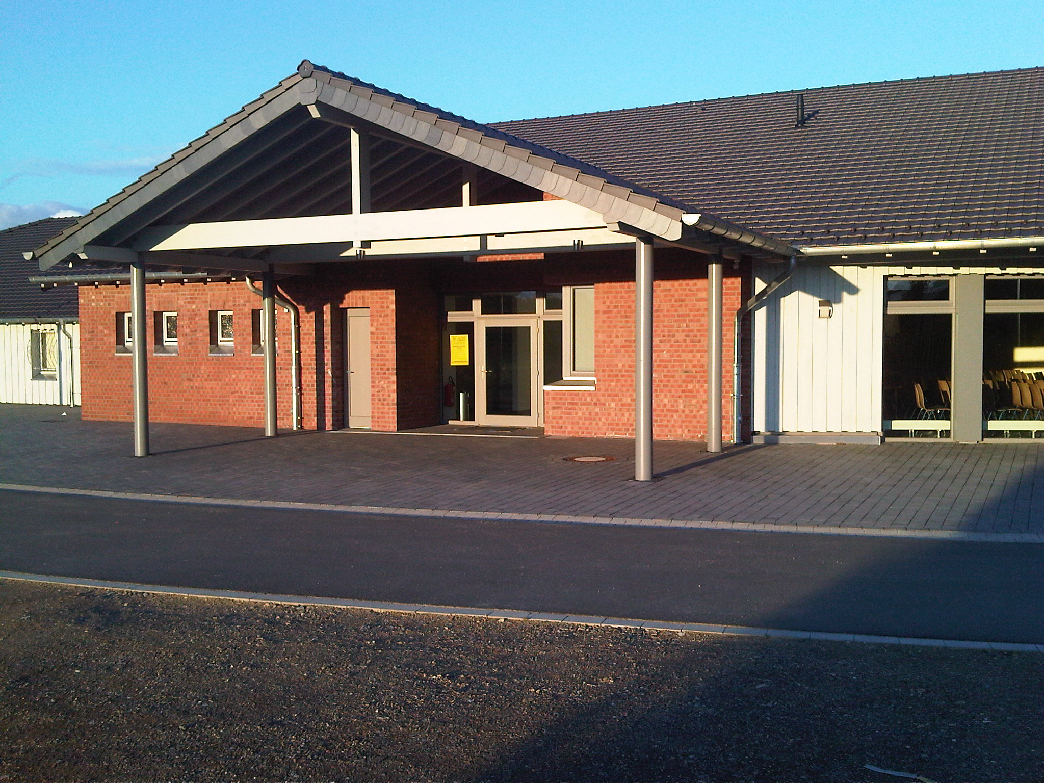 Dieses Foto zeigt den Haupteingang des Pierer Bürgerhauses.